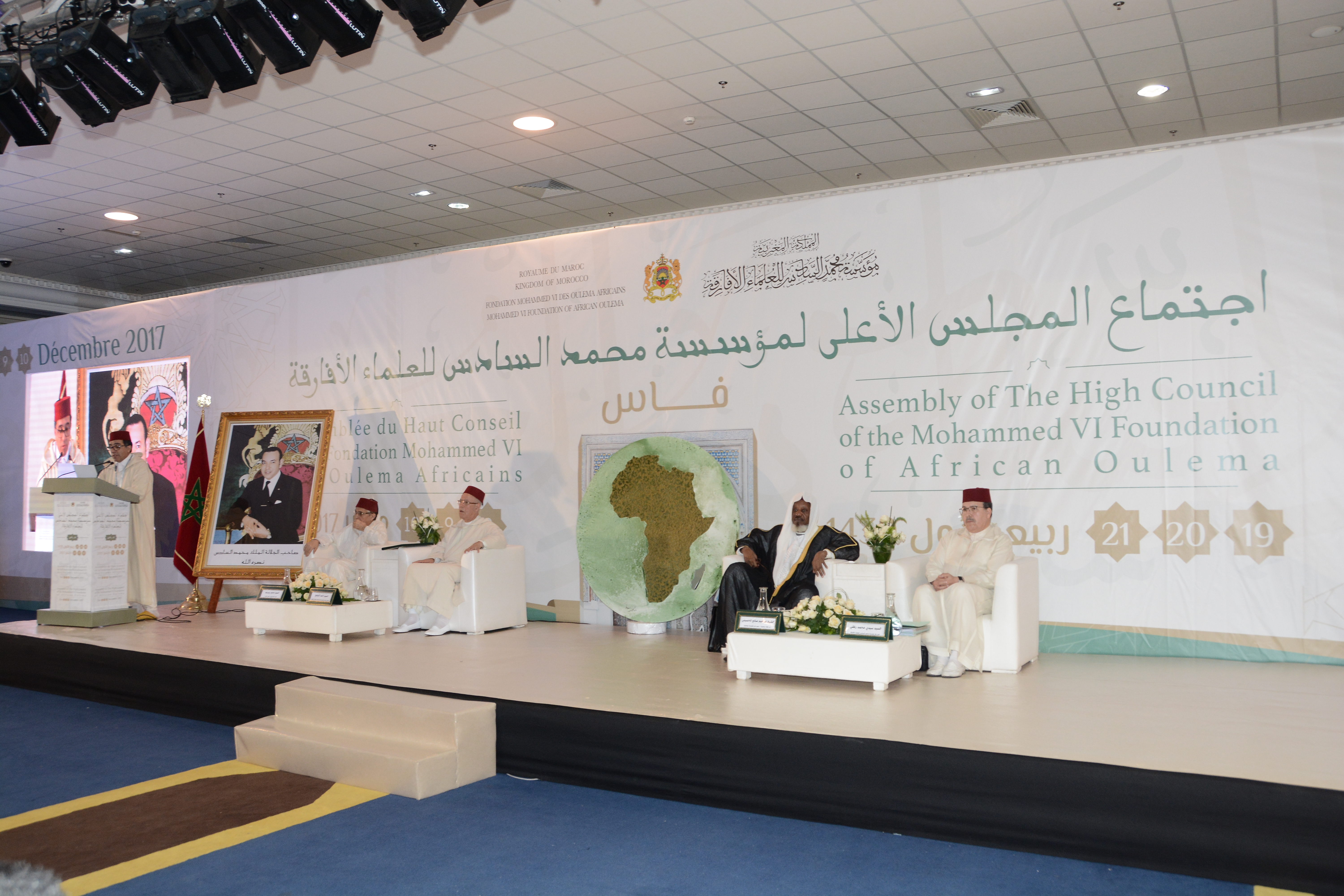 اجتماع المجلس الأعلى لمؤسسة محمد السادس للعلماء الأفارقة في دورته الأولى 08/012/2017